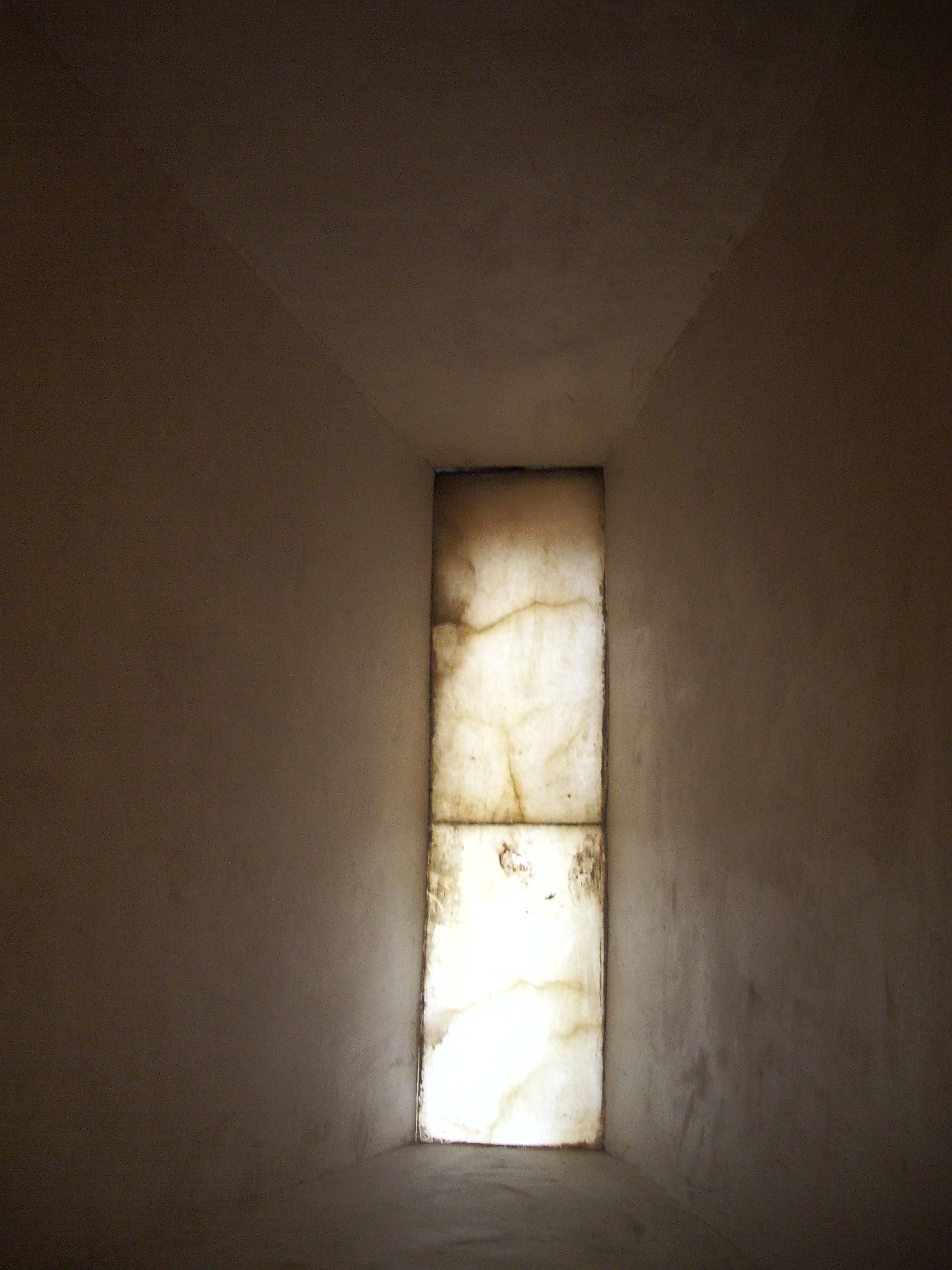 \ventanuco alabastro torre trovador